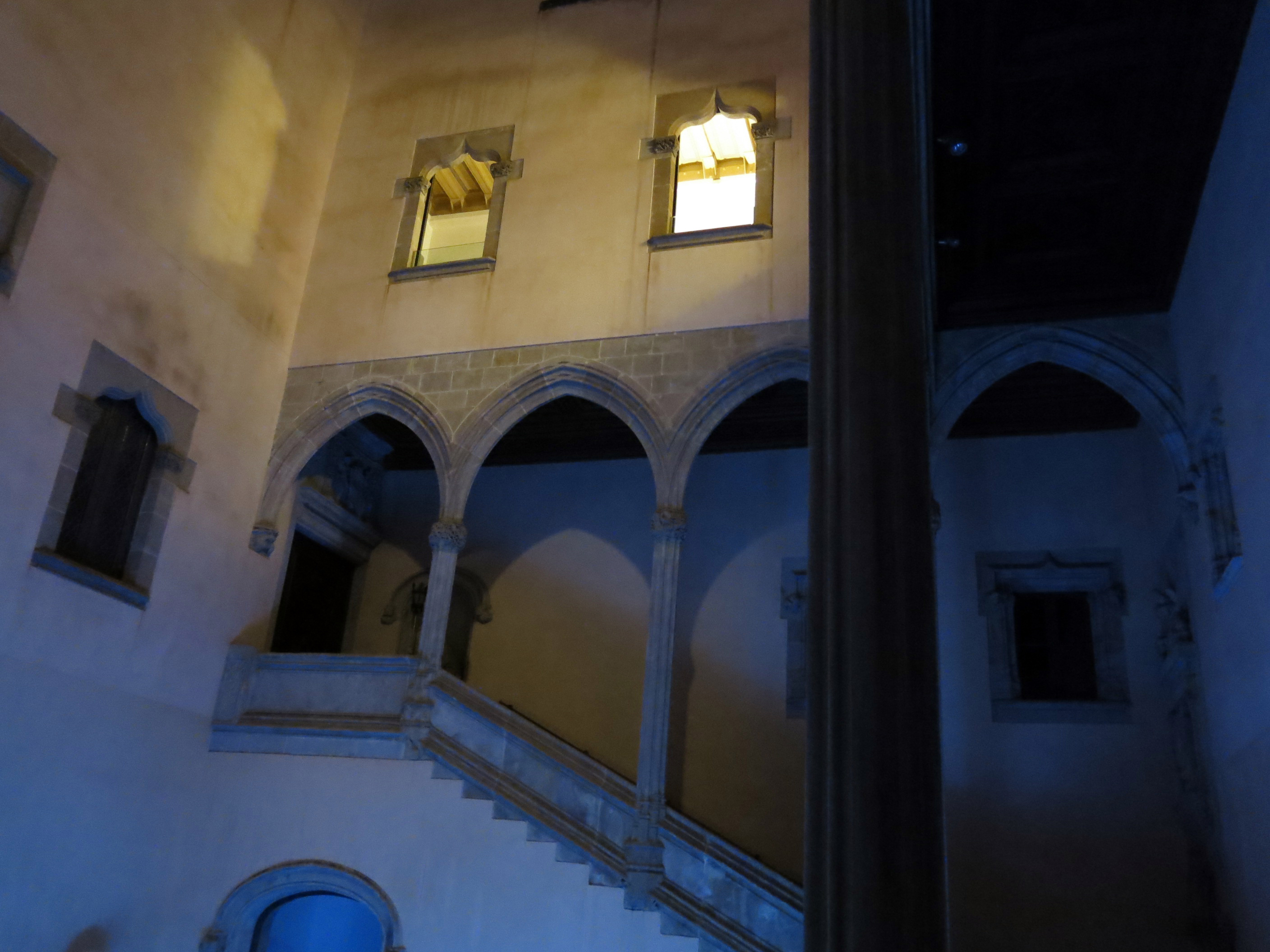 Pati del palau Centelles, Baixada de Sant Miquel, durant el festival Llum BCN (Barcelona)